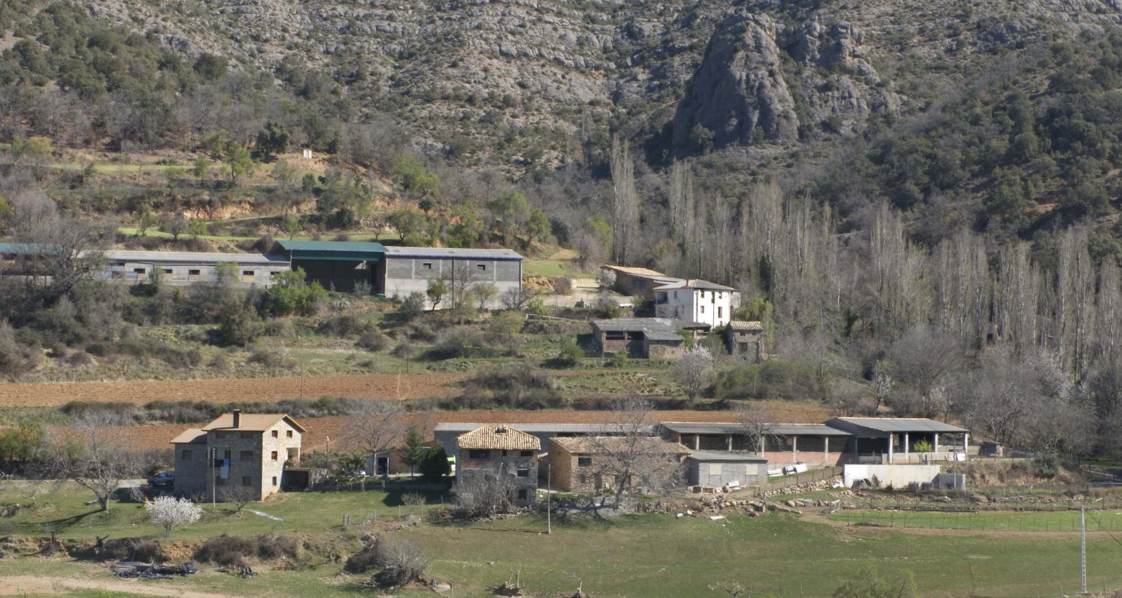 Poblet del municipi d'Isàvena, a la Ribagorça Aragonesa, als peus del Coll de Vent, de la serra del Cis (Sierra de Sis)